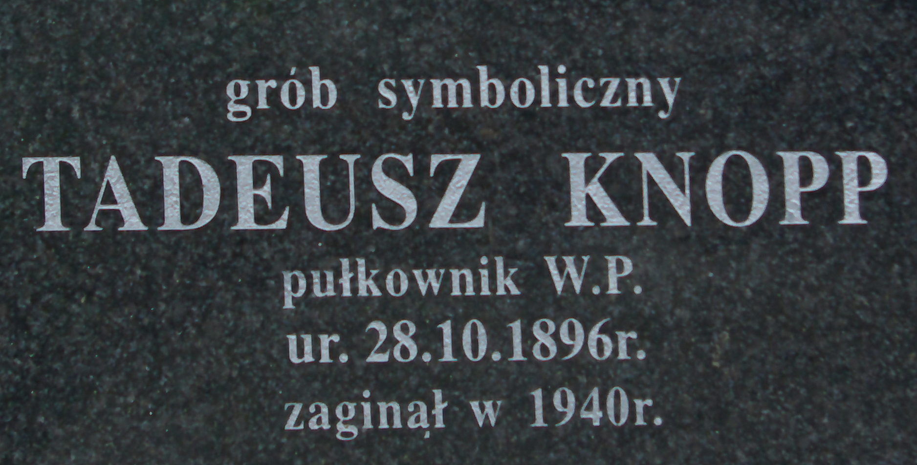 Grobowiec rodziny Knopp na Cmentarzu Centralnym w Sanoku. Symboliczne upamiętnienie Tadeusza Knoppa